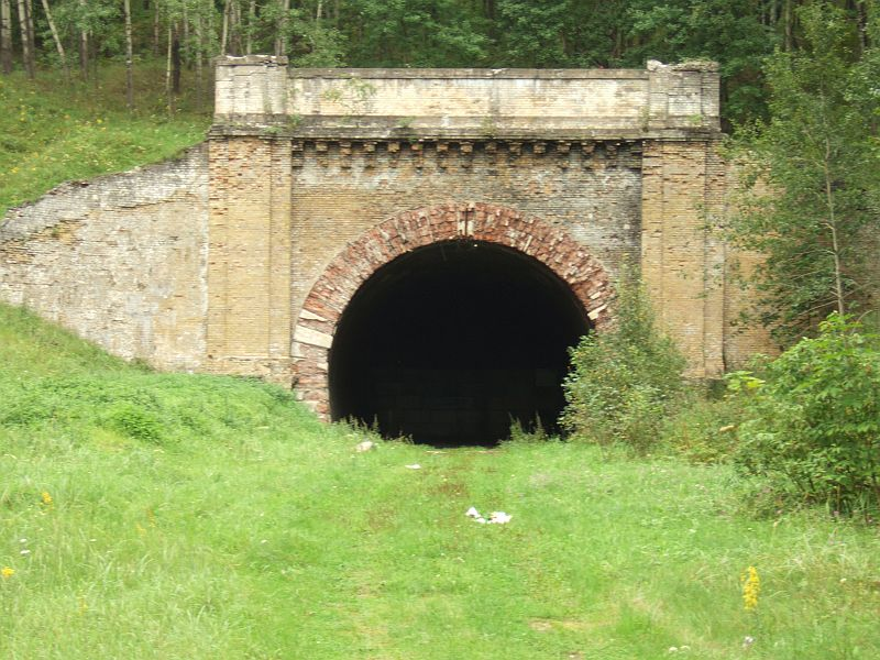 Panerių geležinkelio tunelis (apleistas). Railroad tunnel in Paneriai (2006)